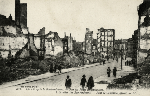 Lille Après le Bombardement. Rue des Ponts de Commines - Époque : l'après Guerre Mondiale 1914-1918. Dimensions : 86 x 138 mm Technique : Impression photomécanique. (carte postale) n°514.Imprimeur : Visé, Paris N°514